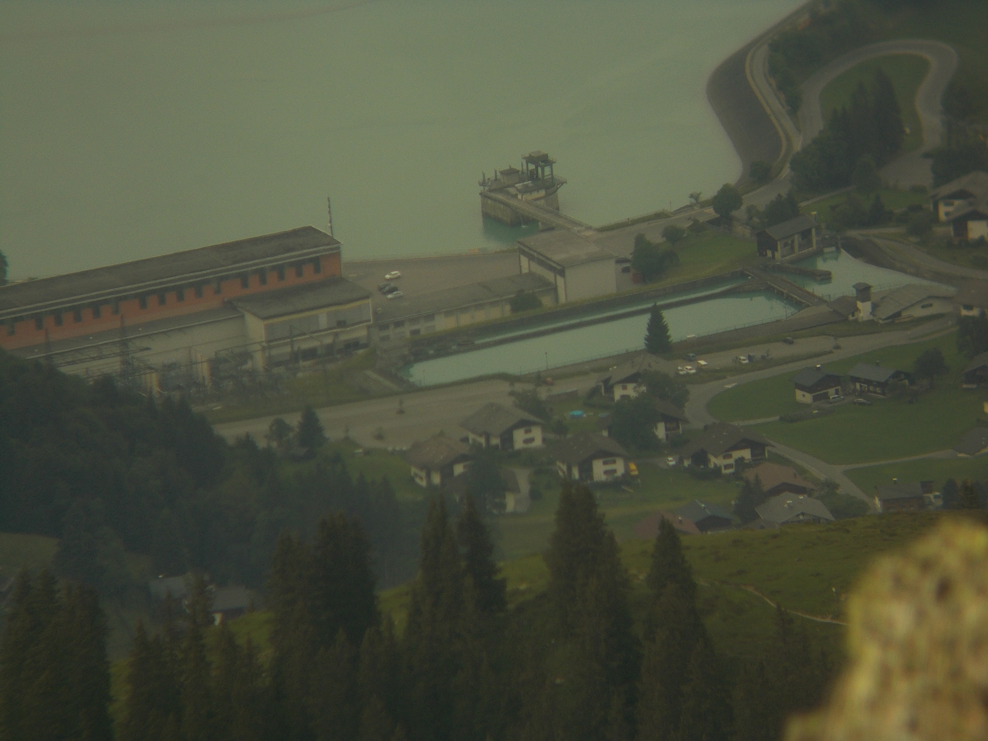 Latschauwerk (rechts oben) und Lünerseewerk (links)